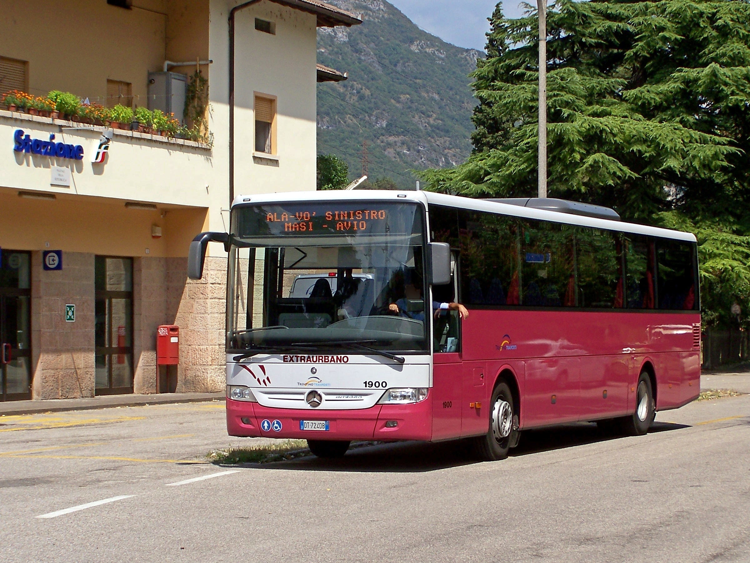 Il Mercedes Integro nr. 1900 di Trentino Trasporti in sosta davanti alla stazione di Ala in attesa di partire per Avio